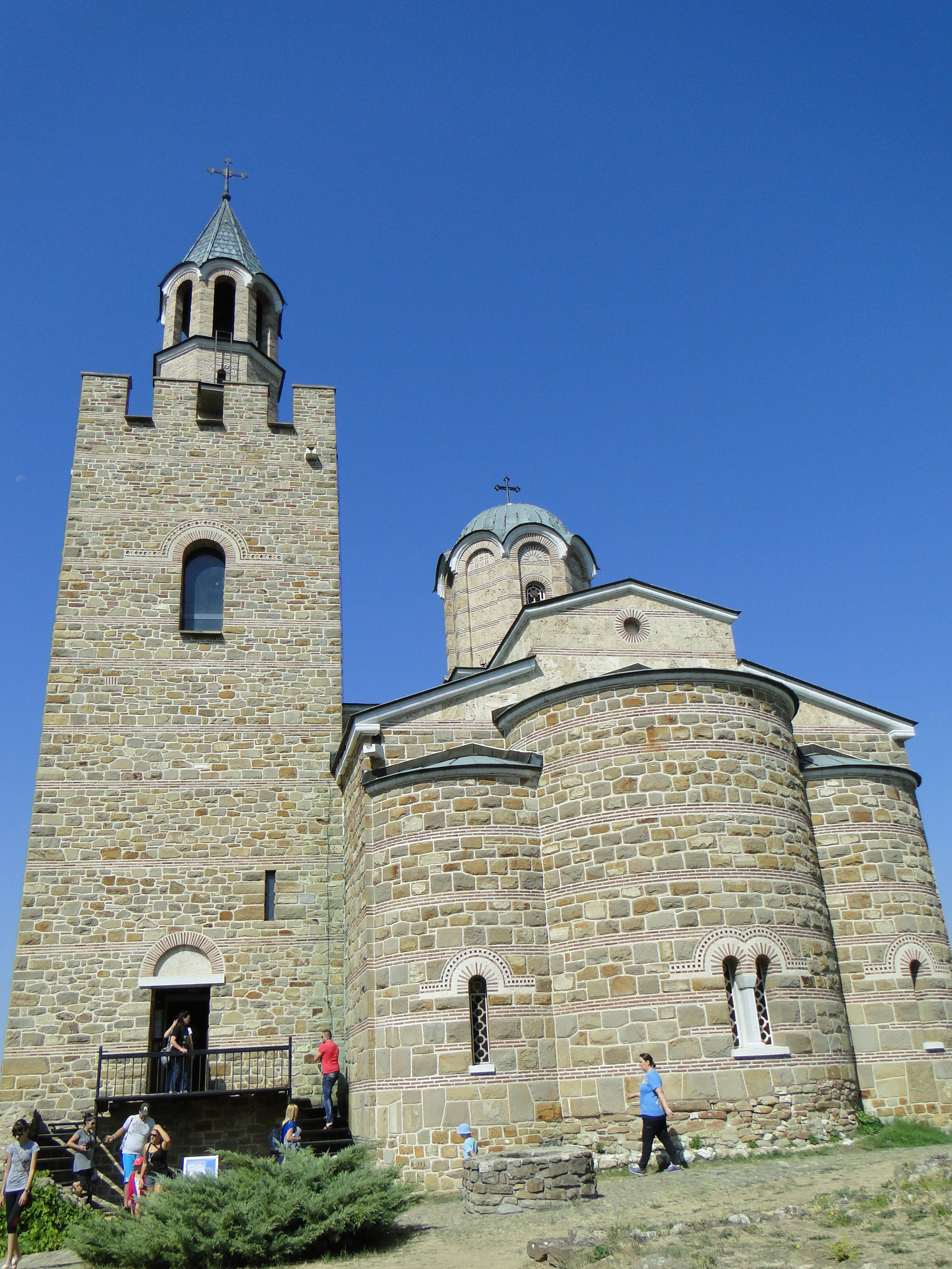 Велико Търново Bulgaria 2012